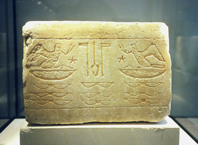 front view